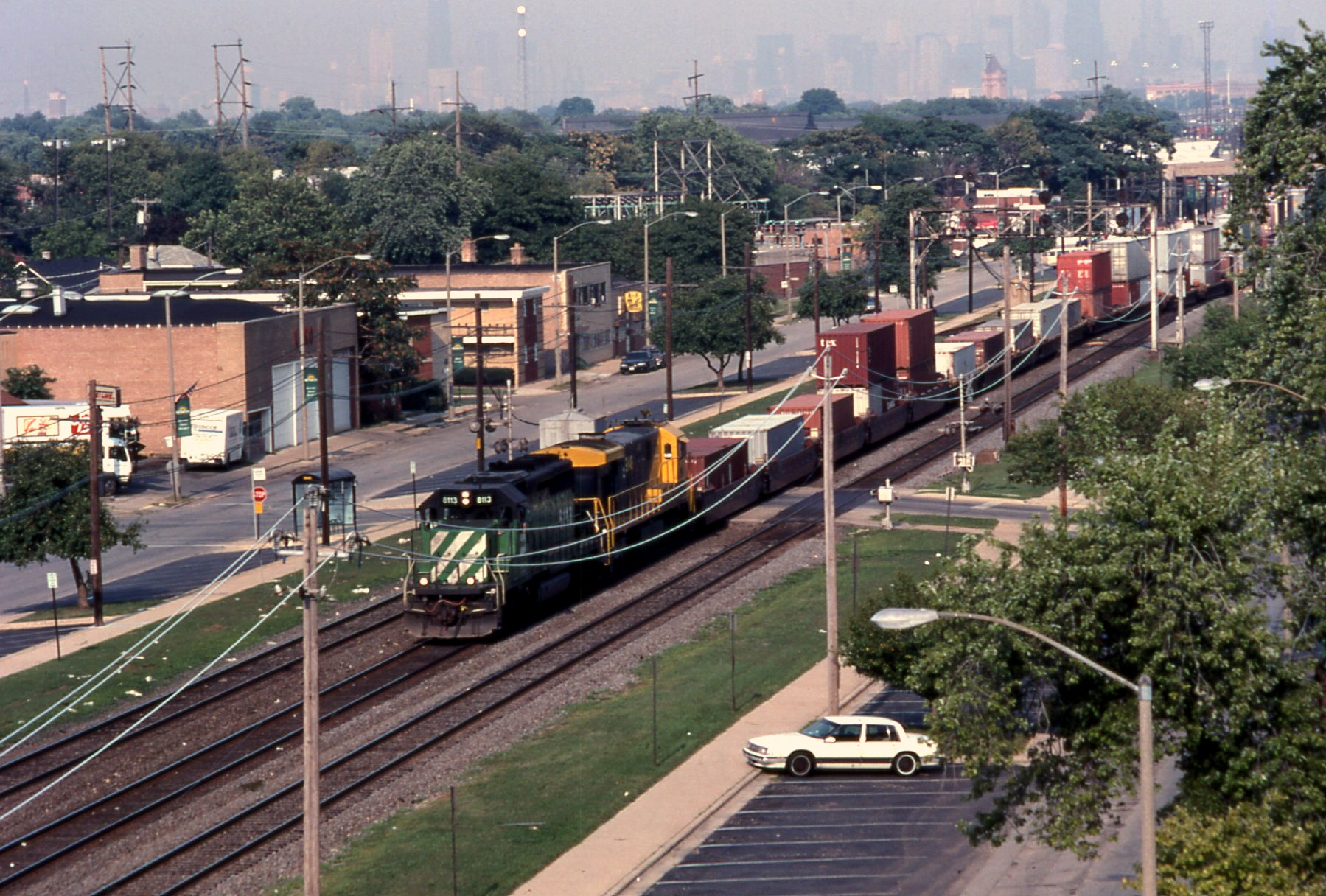 21 BNSF Berwyn, IL